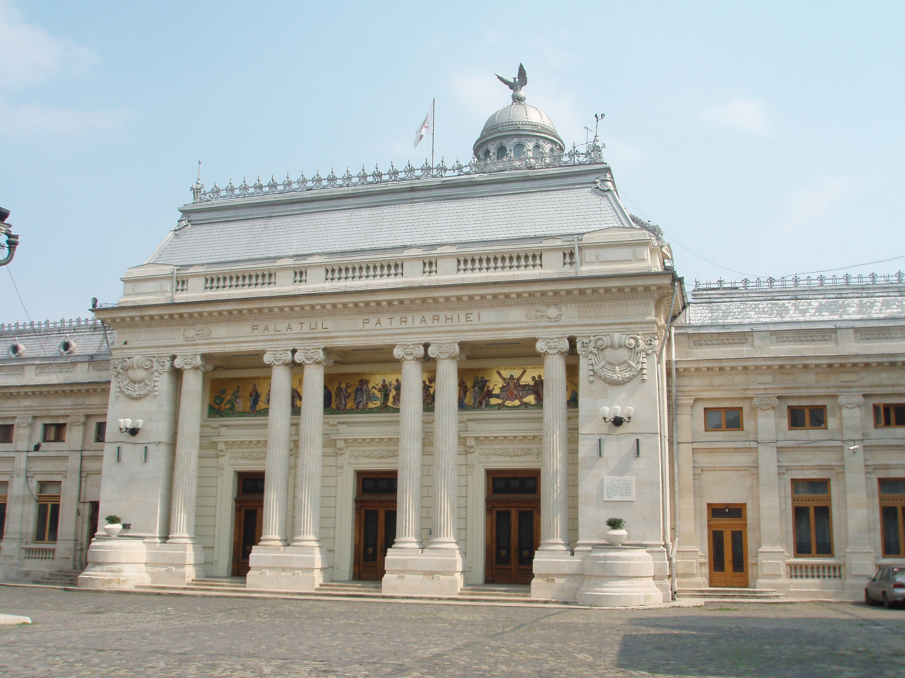 Palatul Patriarhiei